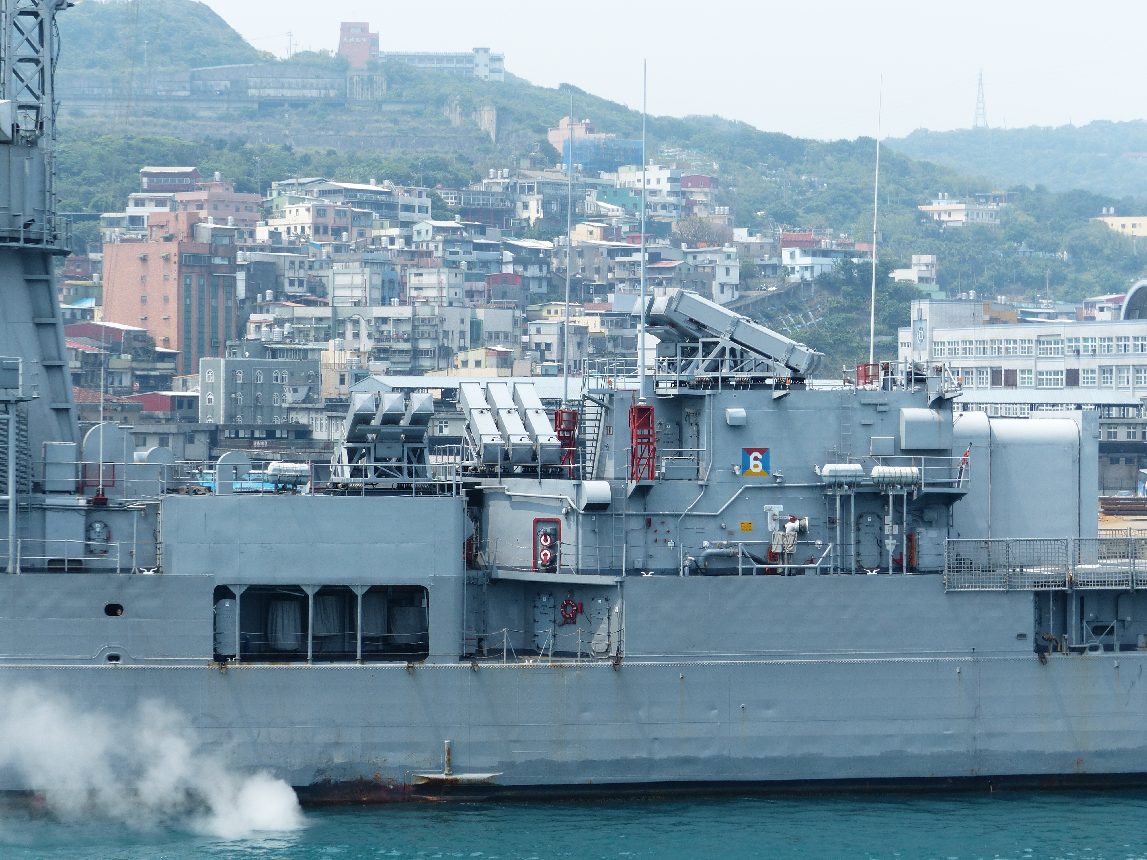 巡防艦宜陽（FFG-939）中段與雄二飛彈發射器特寫。